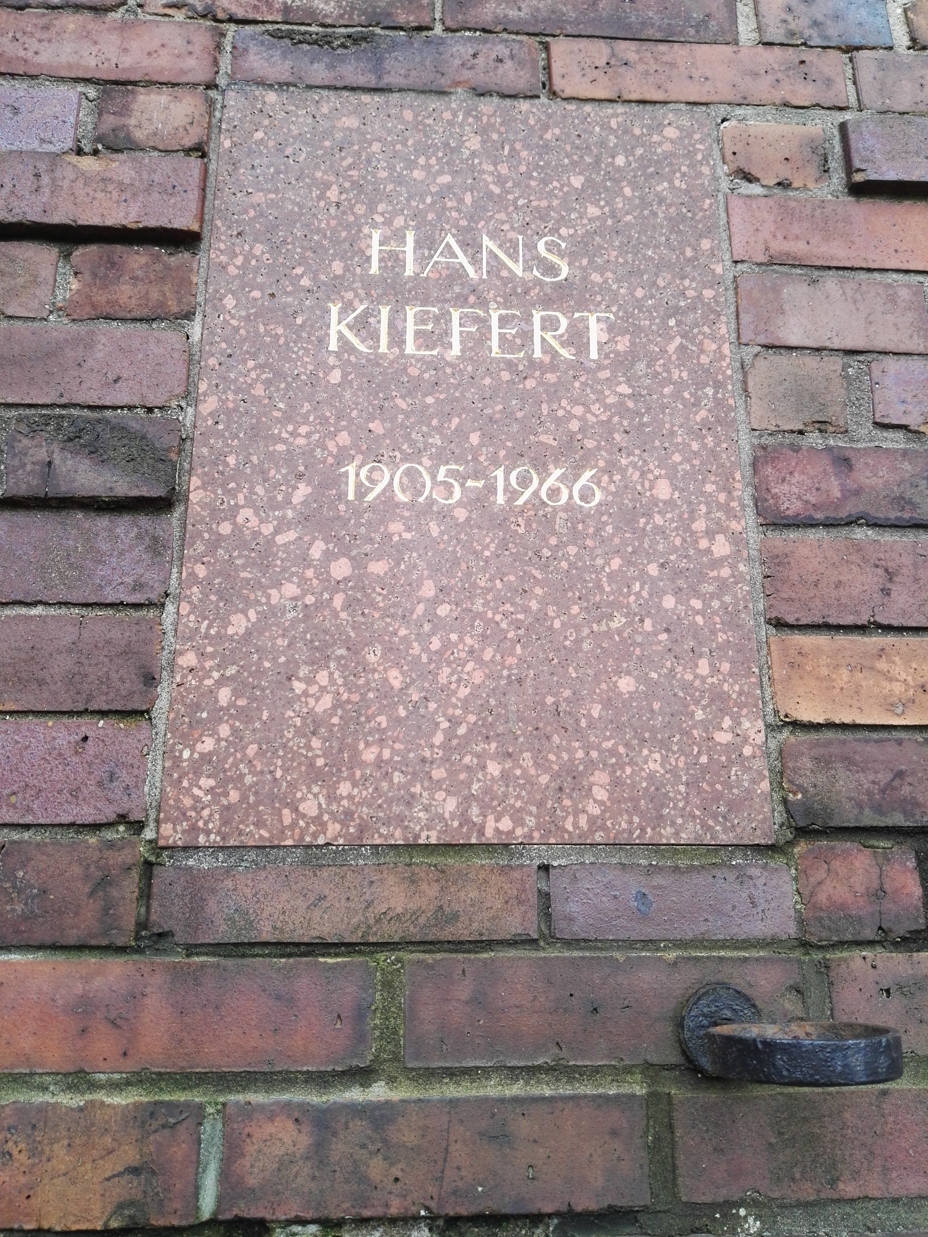 Grab von Hans Kiefert in der Gedenkstätte der Sozialisten auf dem Zentralfriedhof Friedrichsfelde in Berlin-Lichtenberg